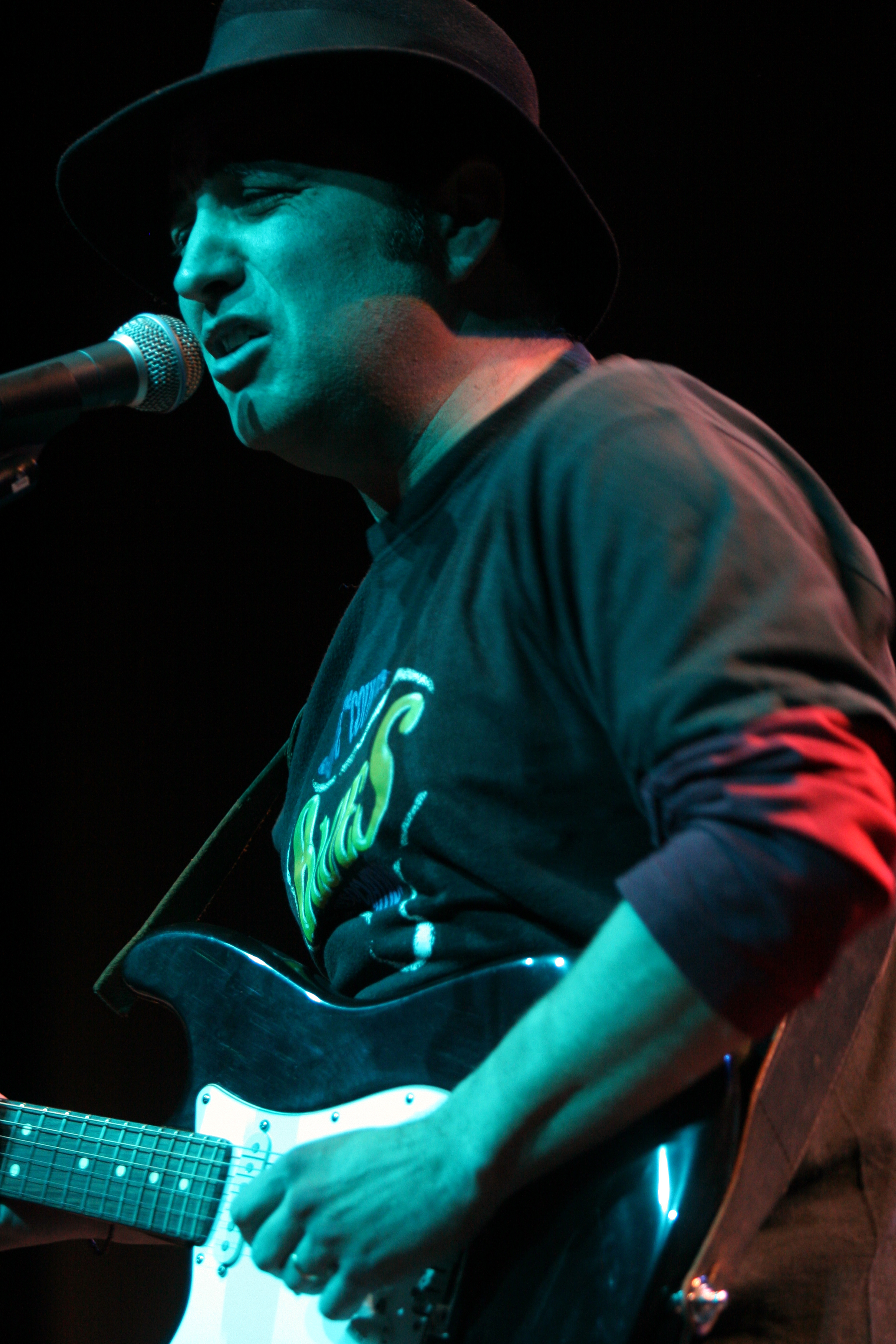 Imaxe do músico galego de blues, Víctor Aneiros, tocando a súa guitarra eléctrica.